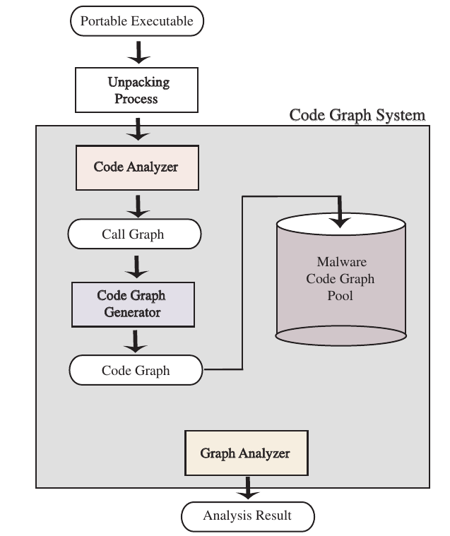 Ajout d'une signature dans la base de connaissances